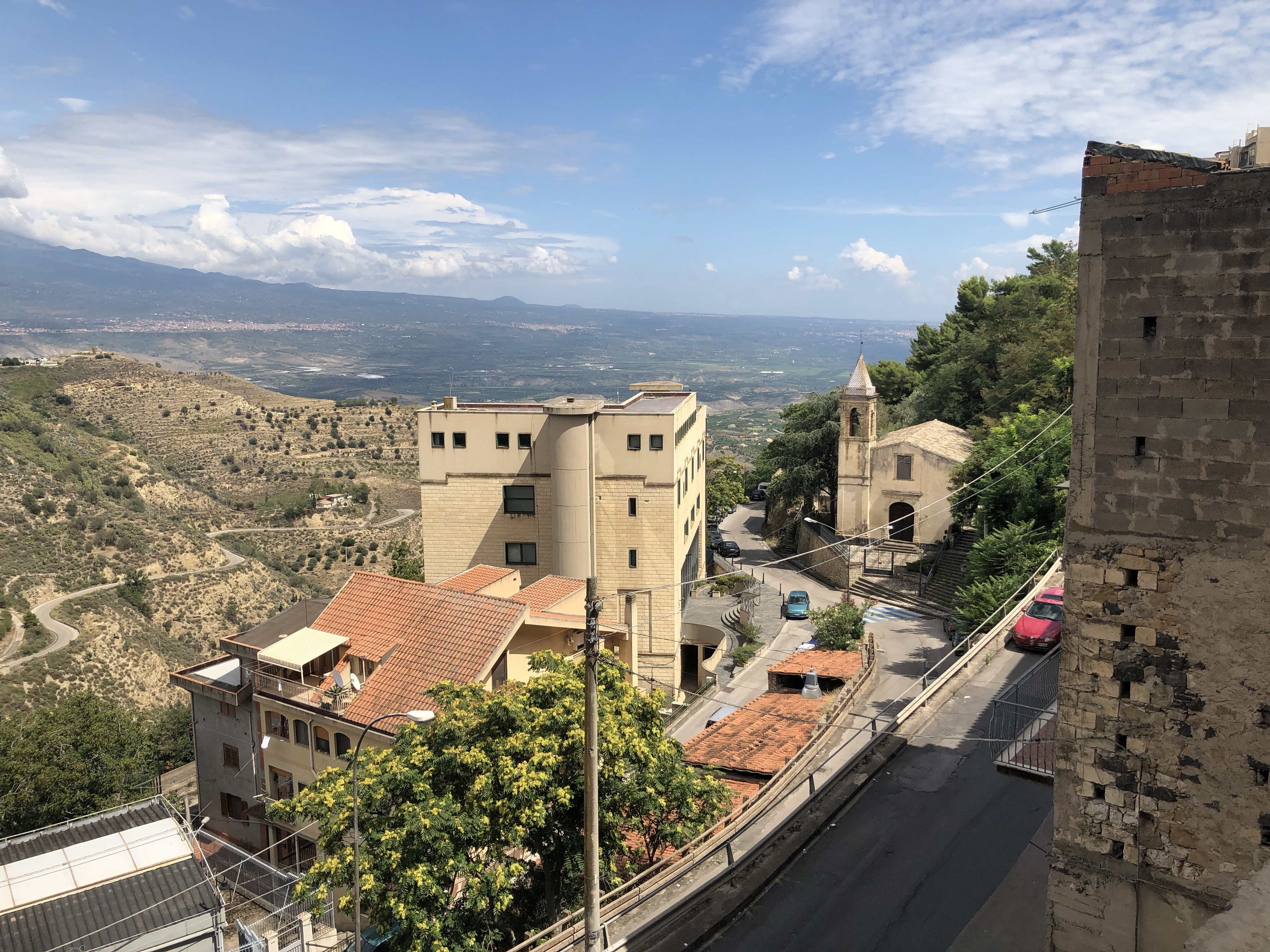 Veduta del Museo archeologico regionale di Centuripe